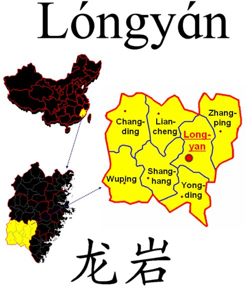 Kreisebene der bezirksfreien Stadt Longyan